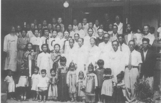 1943년 윤치호, 윤보선의 문중 사진 (네번째 줄 왼쪽 맨끝, 도포를 입은 이가 윤치호, 다섯번째 줄 왼쪽 맨 끝, 윤치호 바로 옆으로 보이는 남성이 윤보선